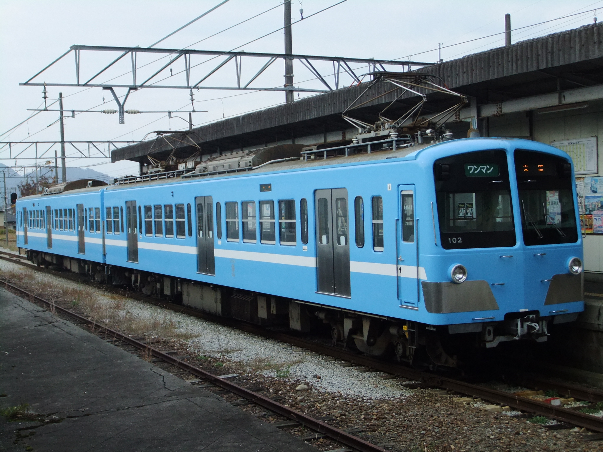 近江鉄道 102 貴生川駅